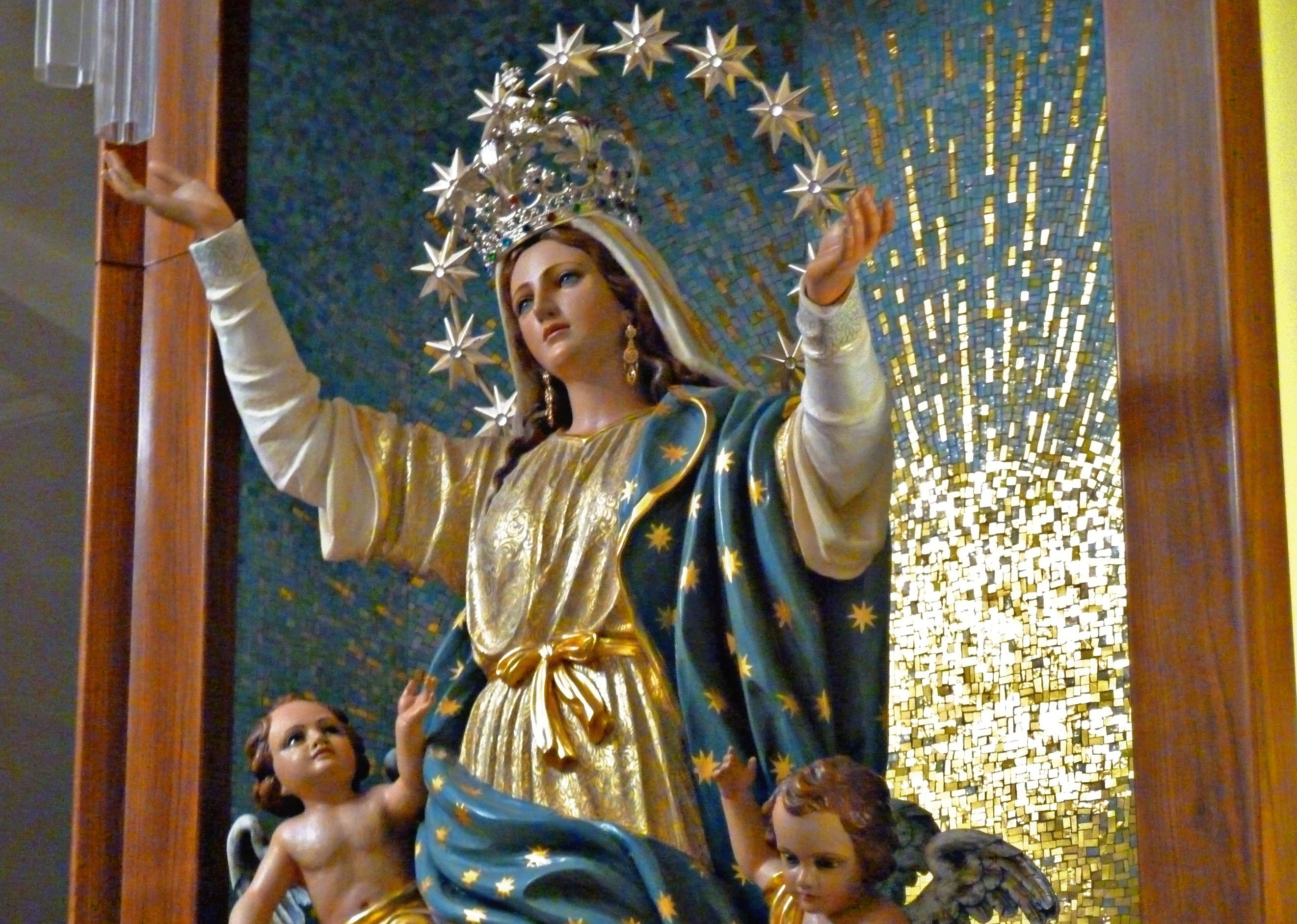 Foto di Santa Maria Assunta